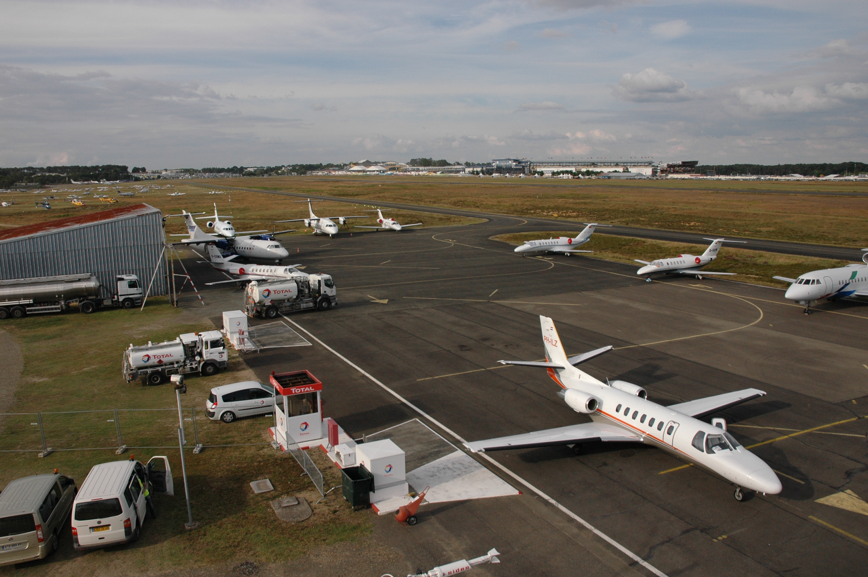 avions 24h du mans 2008